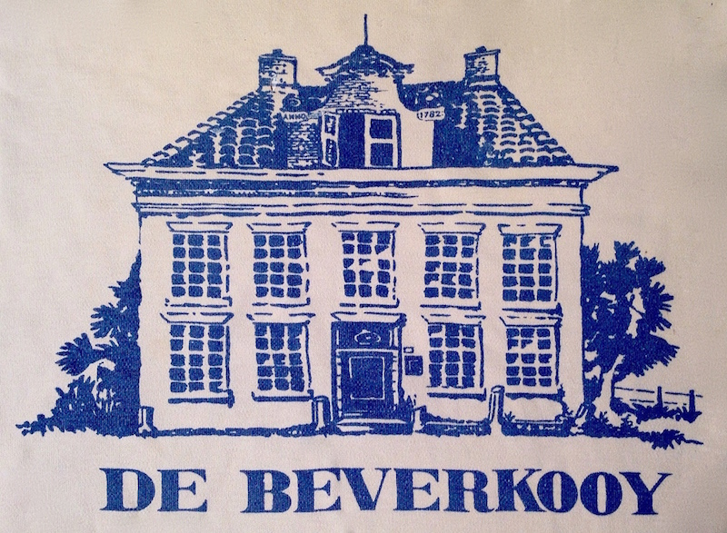 De Beverkooy, zoals afgedrukt op een T-shirt.